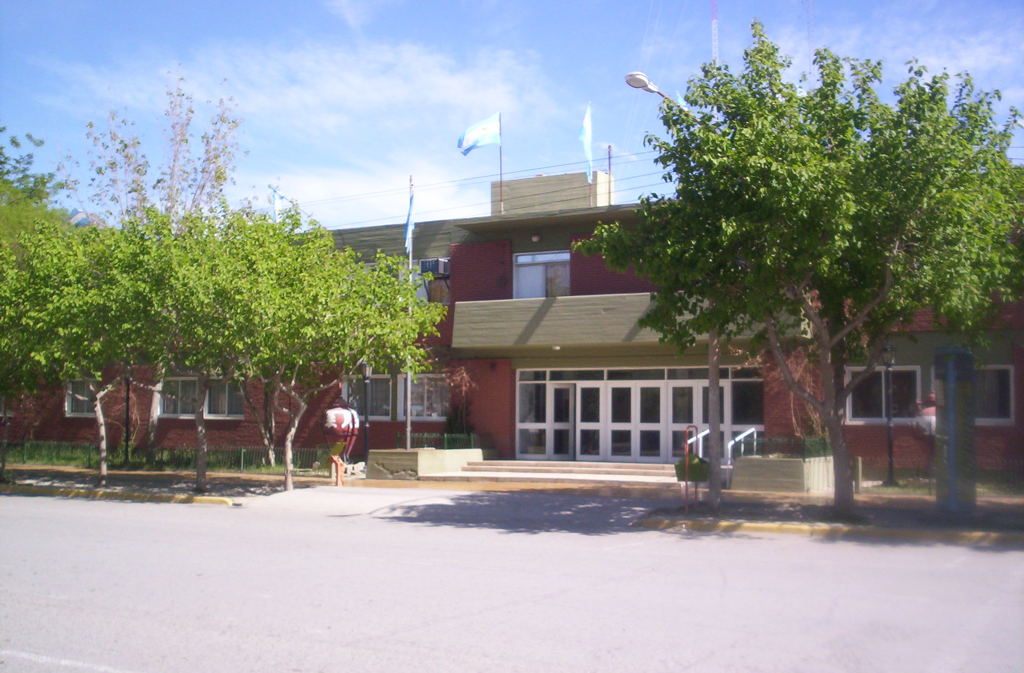 Vista del edificio de la Municipaliad del departamento Jáchal, ubicado en la ciudad de San José de Jáchal, provincia de San Juan, Argentina